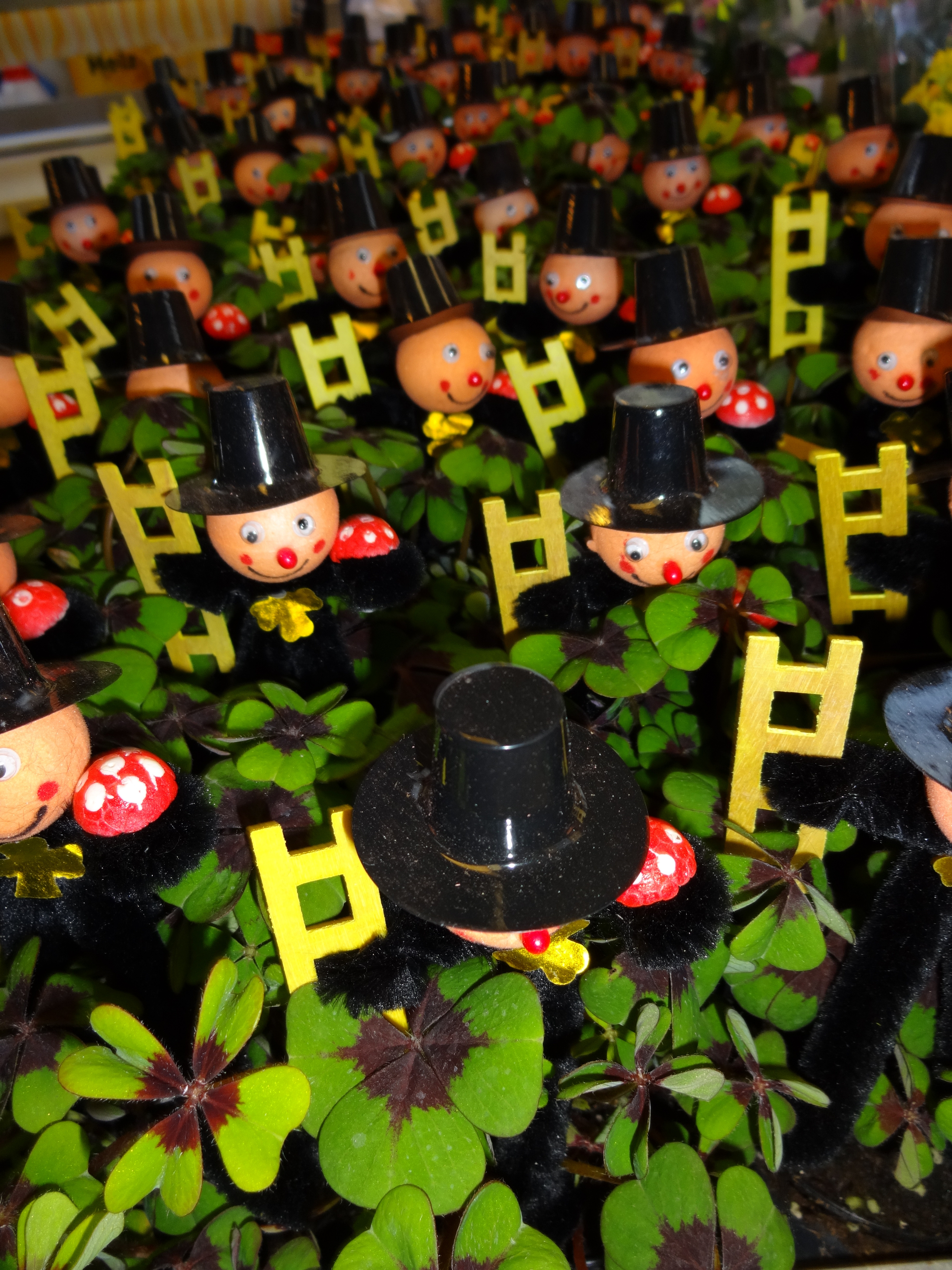 Schornsteinfeger und Klee.